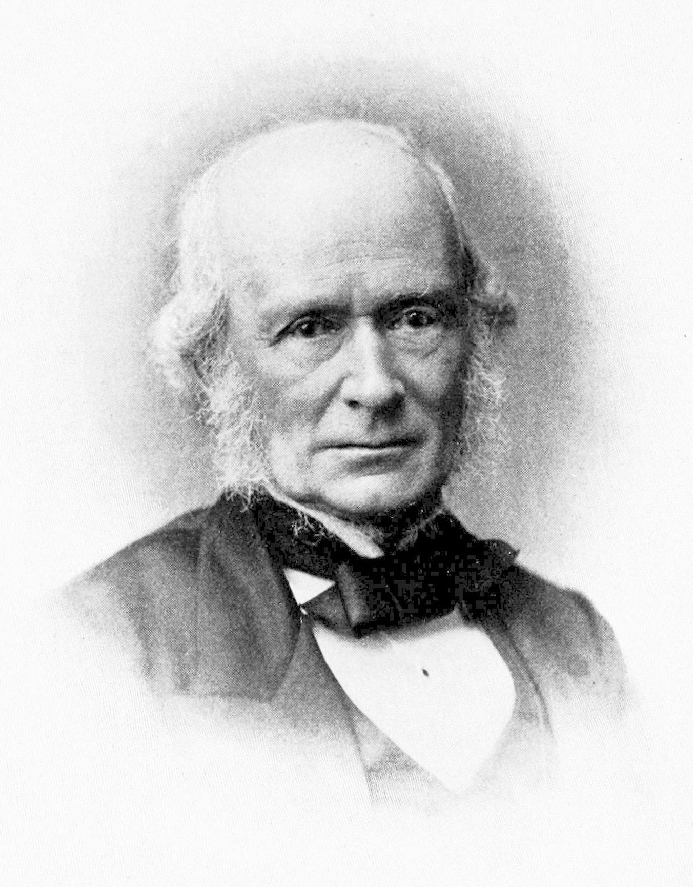 Joseph Prestwich